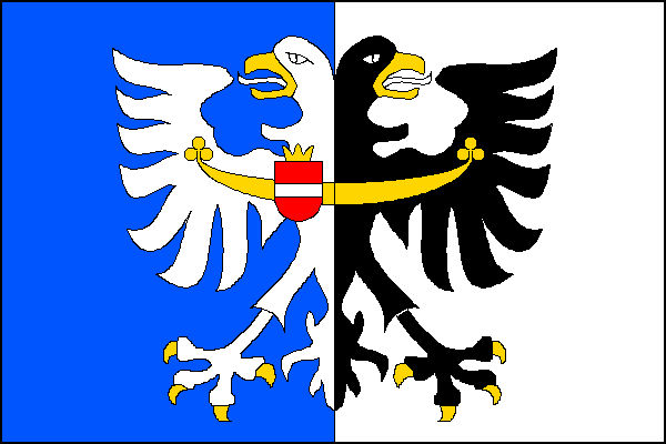 vlajka, Polkovice, okres Přerov